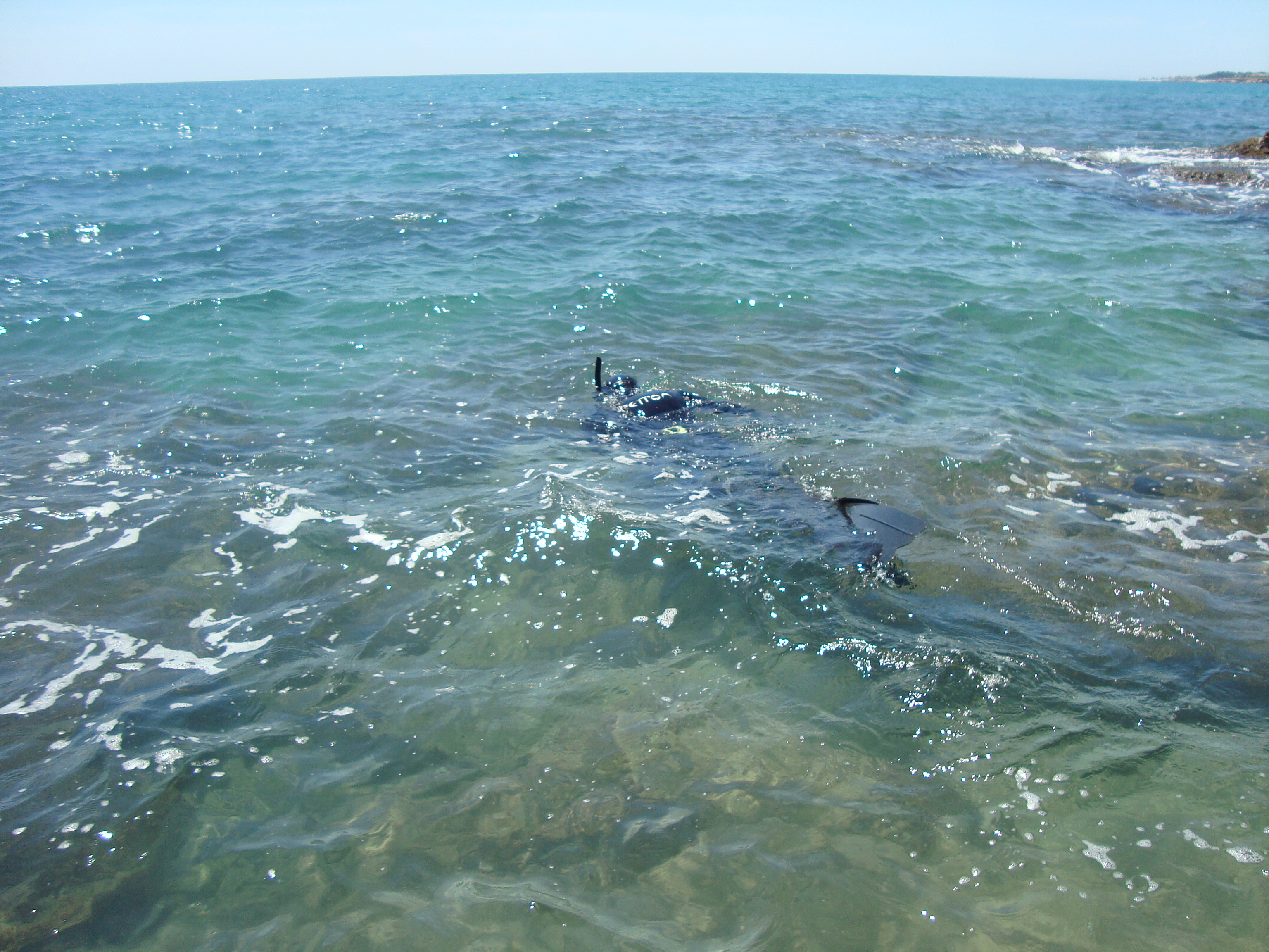 Esnórquel